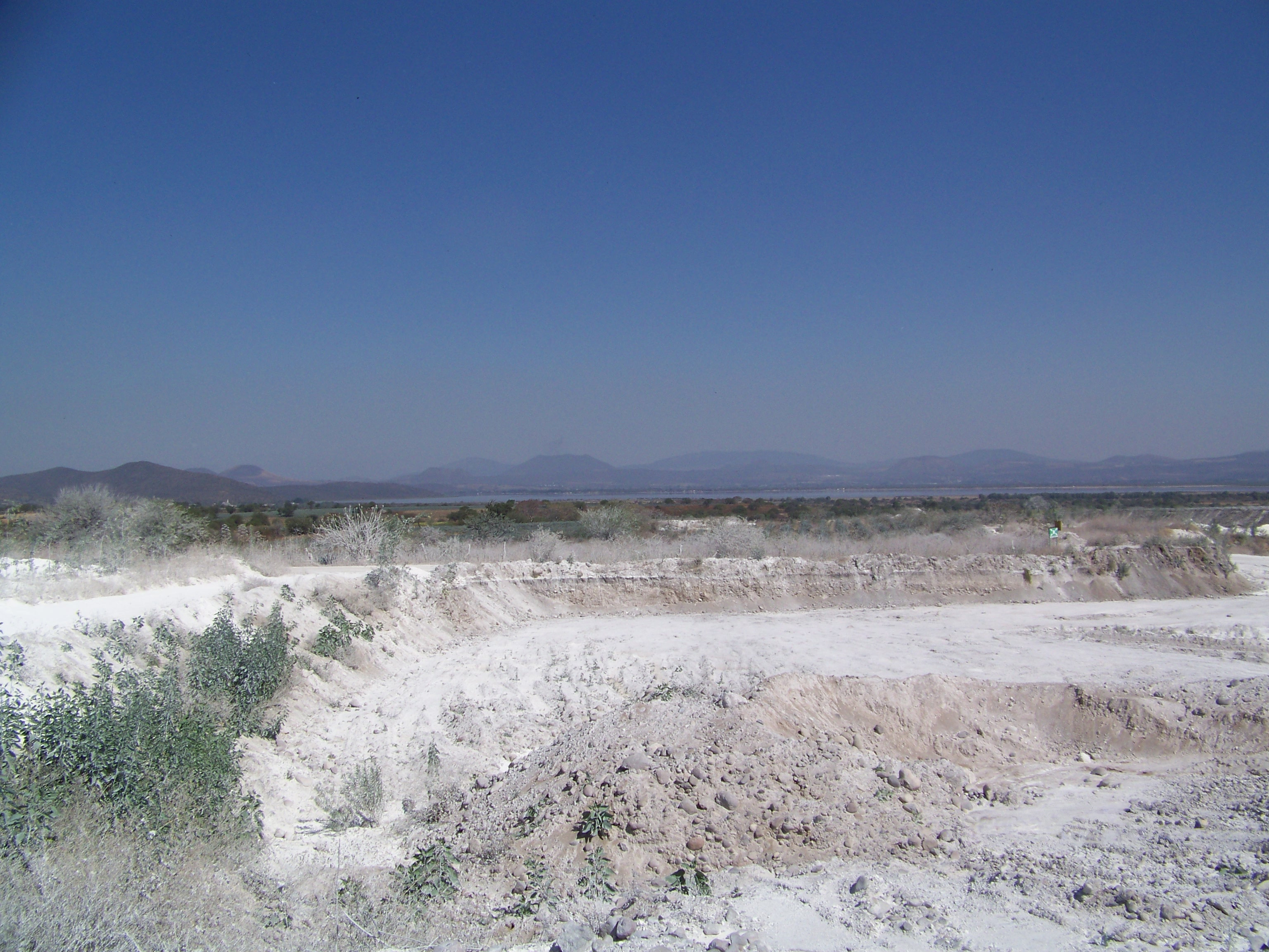 Mina de diatomita conocido en el lugar como la Tizatera